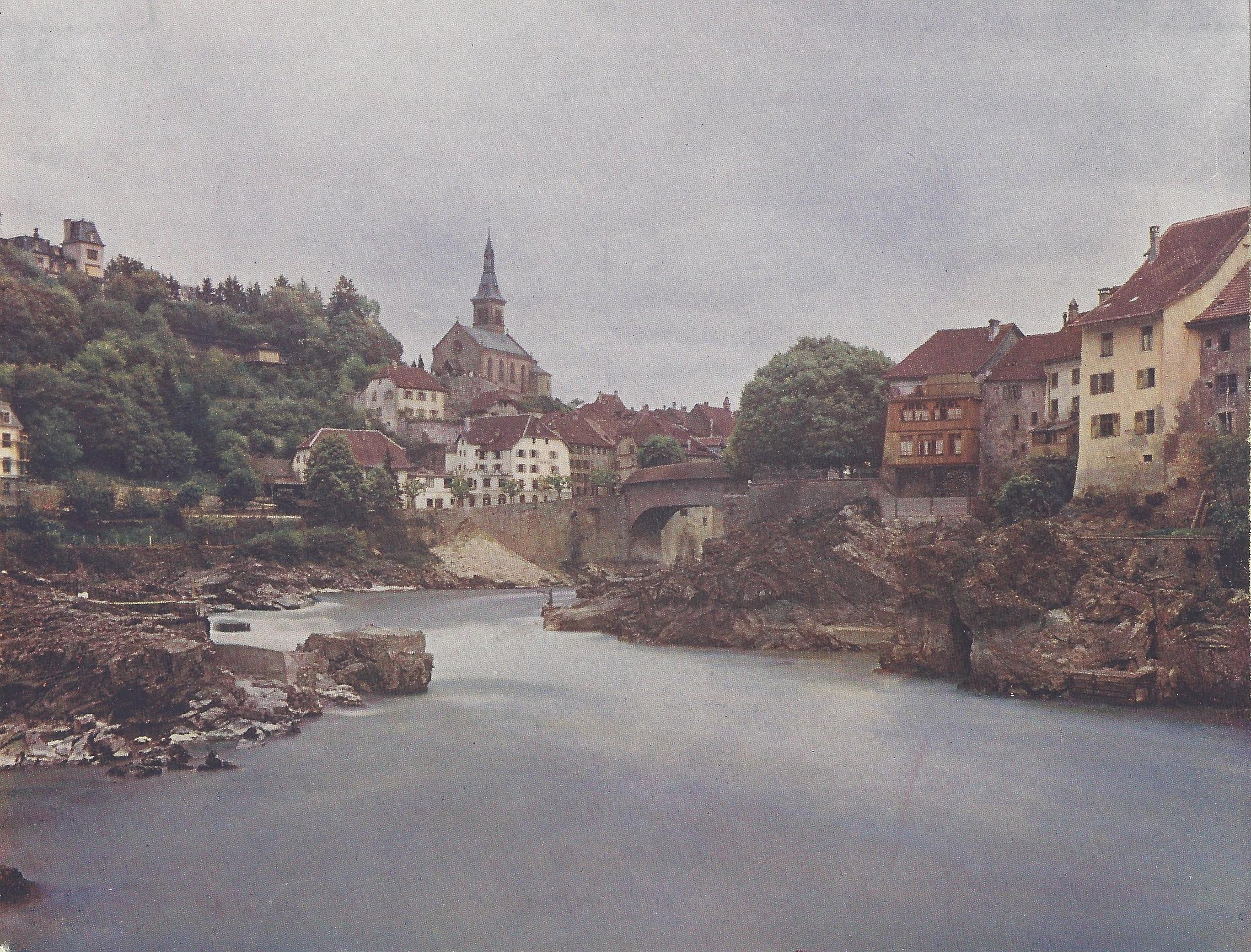 Farbfotografie nach den Autochromverfahren aus: Der Schwarzwald in Farbenphothographien, Wagner Freiburg 1910-1911, Tafel Nr. 33: Laufenburg